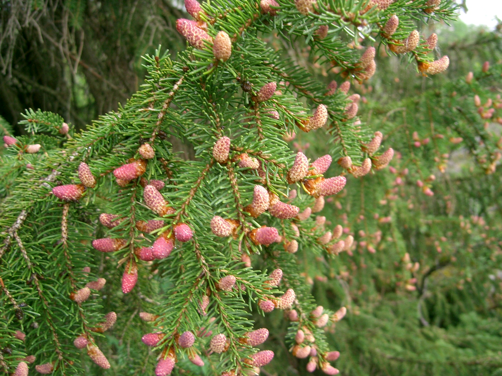 Picea abies pollen cones (immatures) - Cônes de Picea abies